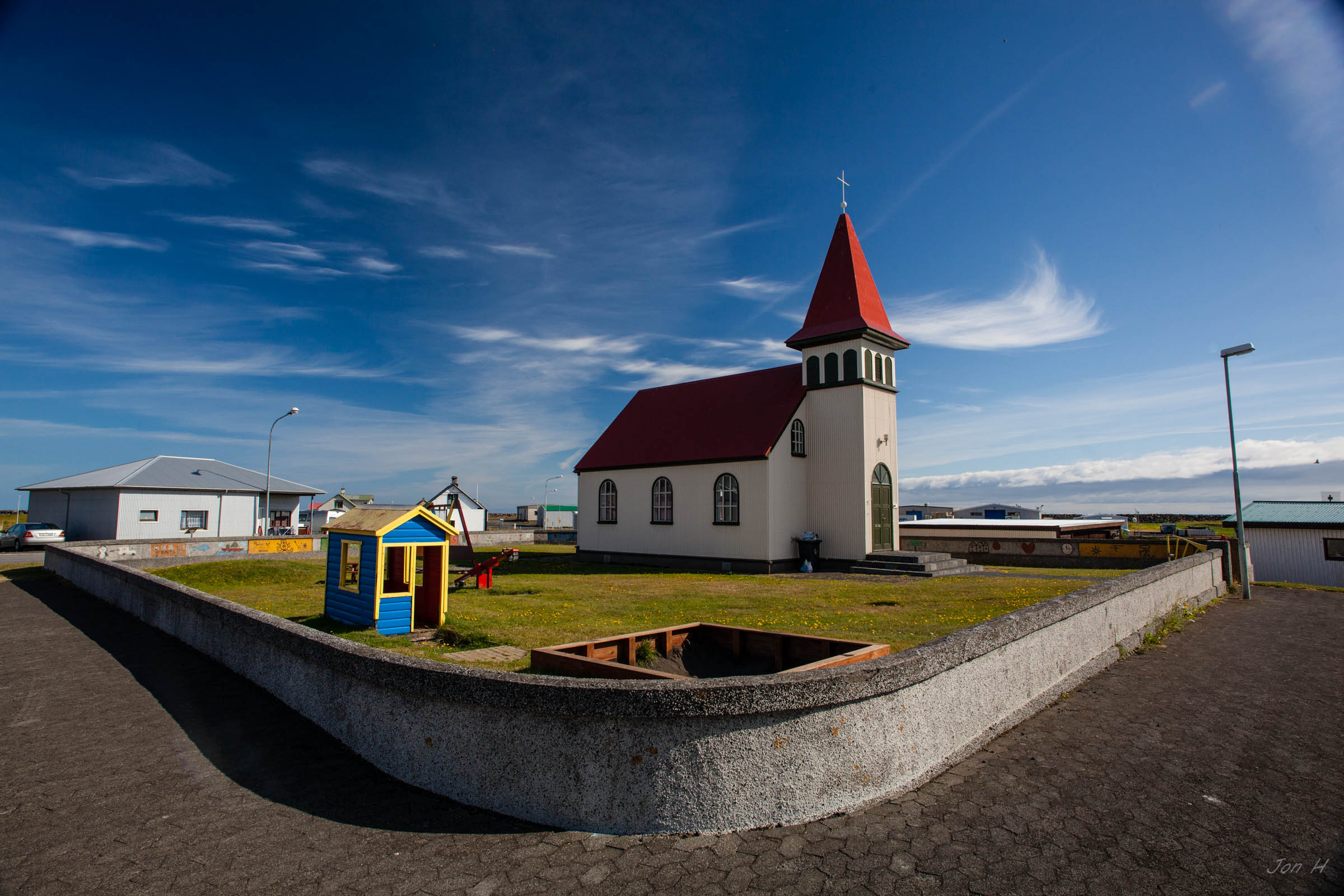 Grindavíkurkirkja